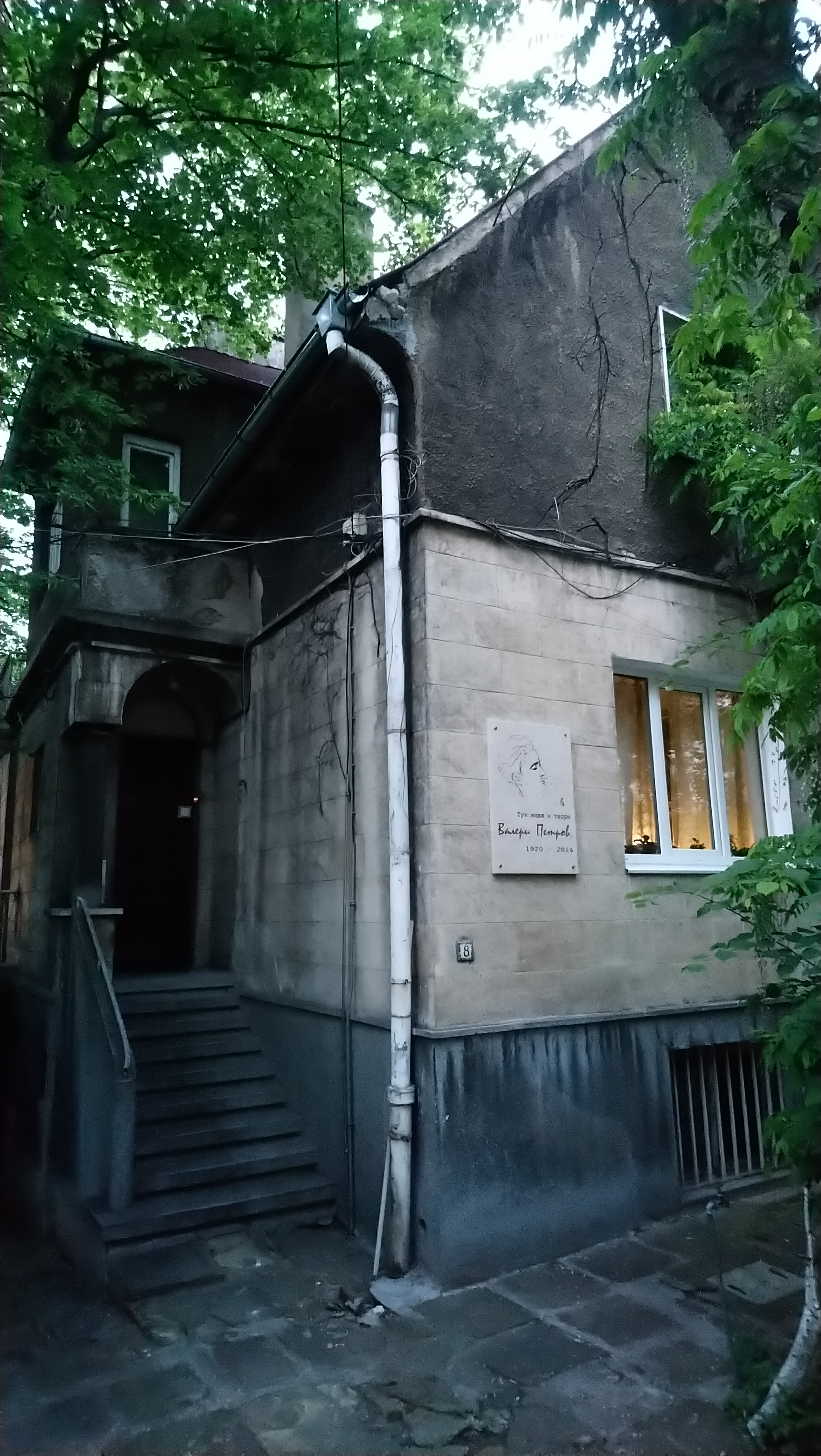 Домът на писателя Валери Петров, ул Елин Пелин 8, София